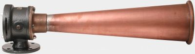 Diaphone